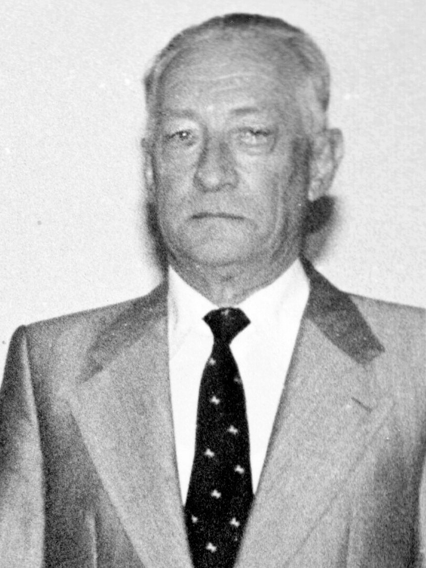 Heinz Hohlfeld (ehemaliger Präsident des Deutschen Schachbundes).